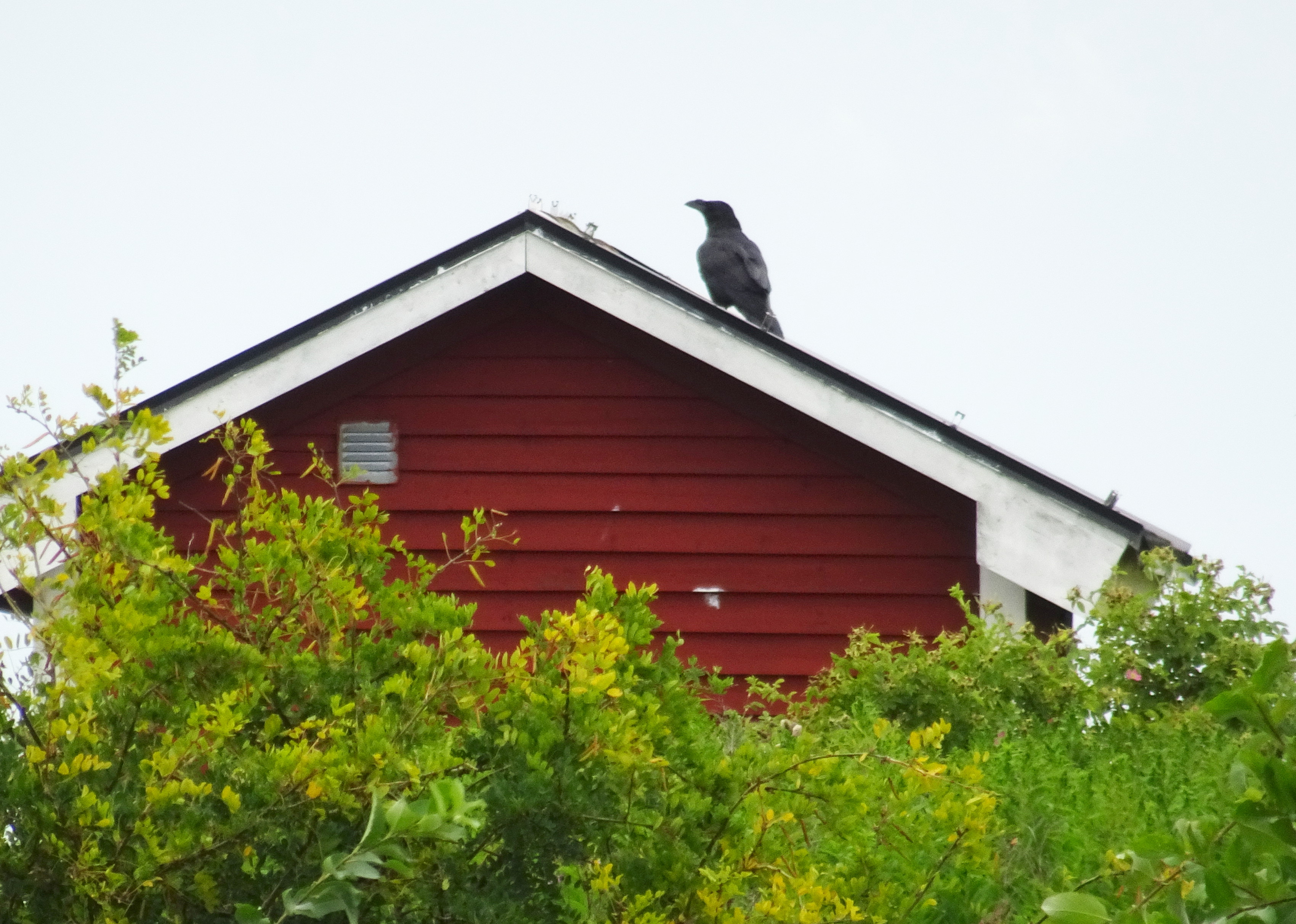 Rovfågelleden, väntande korp nära utfodringsplatsen